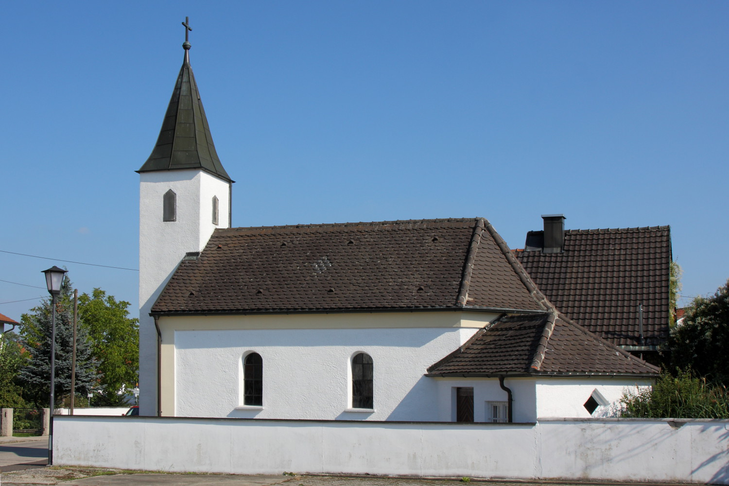 Katholische Ortskapelle in Winden a.Aign, um 1900This is a photograph of an architectural monument.